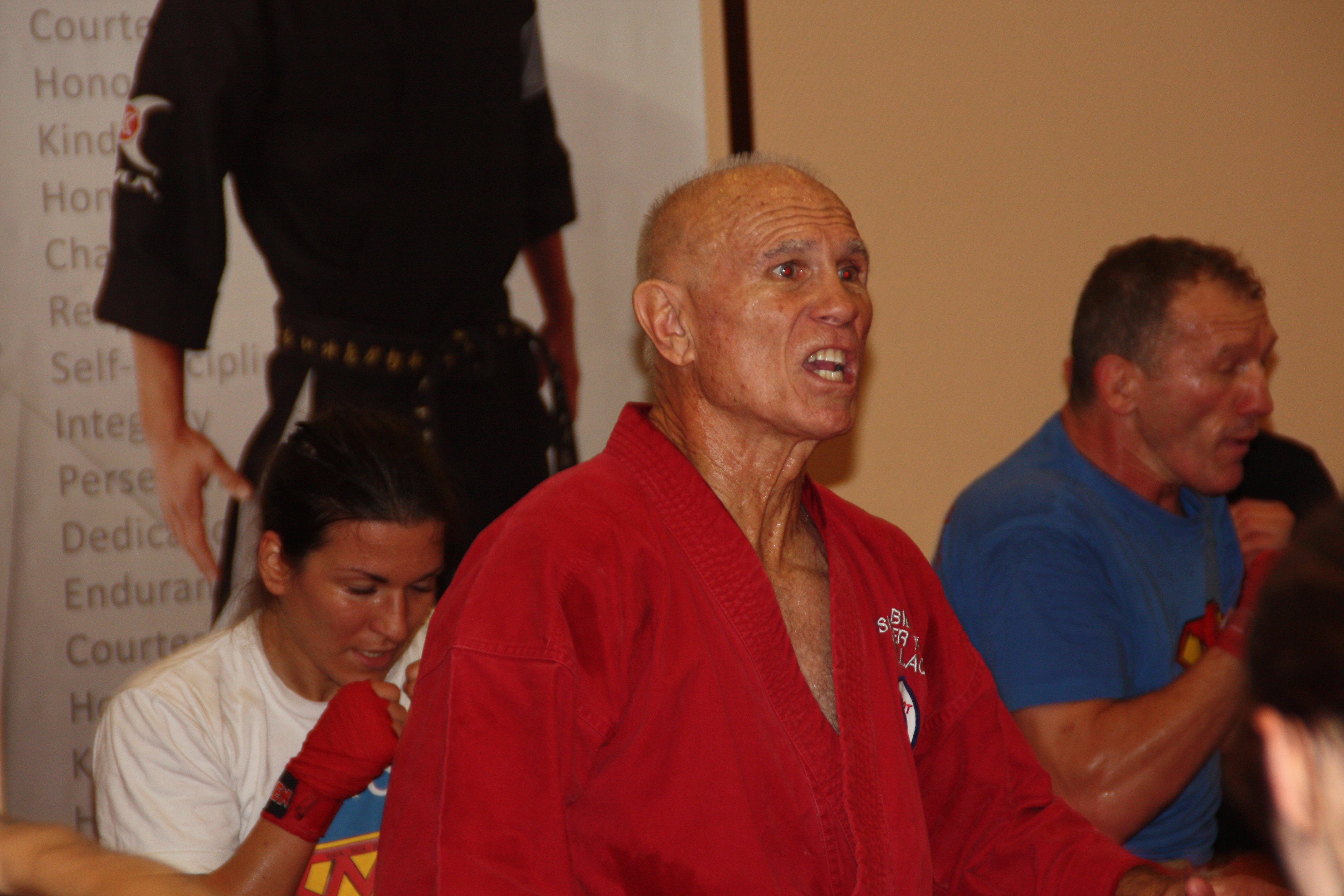 Bill Wallace und (Ferdinand Mack im Hintergrund)